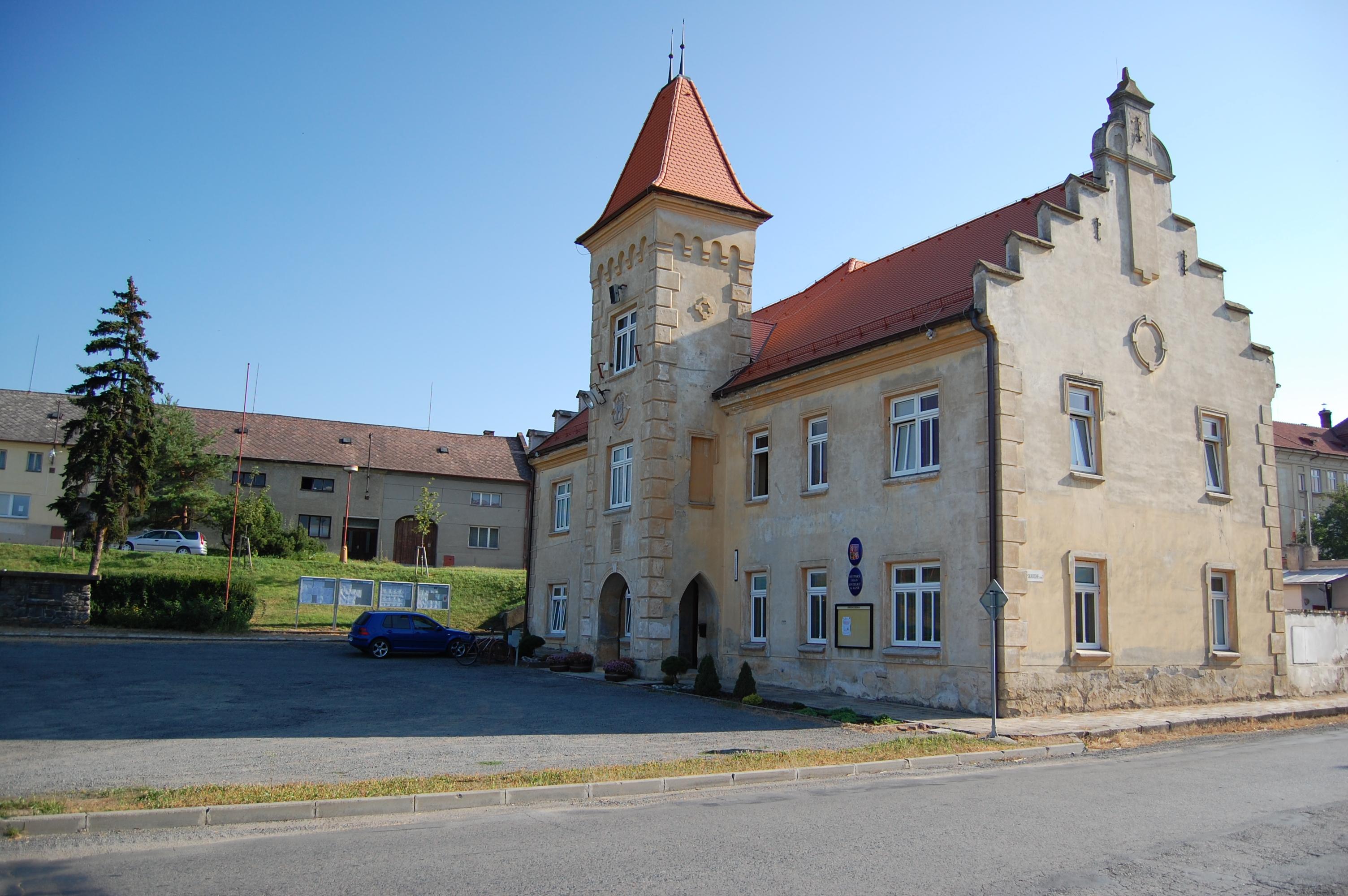 Obecní úřad, Kostelec na Hané, okres Prostějov